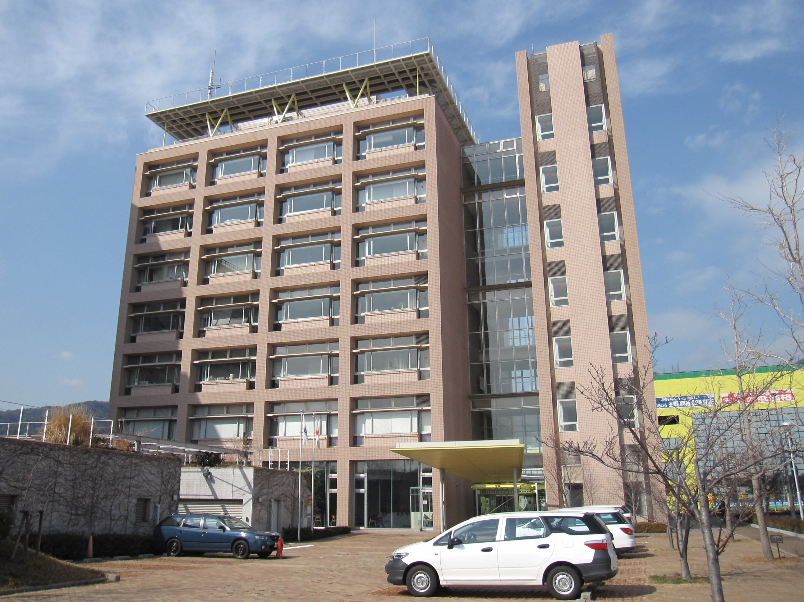 神戸防災合同庁舎。以下の官署が入居する。 神戸海洋気象台、防衛省近畿中部防衛局調達部装備課、航空自衛隊第2補給処調達部調達管課神戸調達処理班、自衛隊兵庫地方協力本部、動物検疫所神戸支所、近畿厚生局兵庫事務所